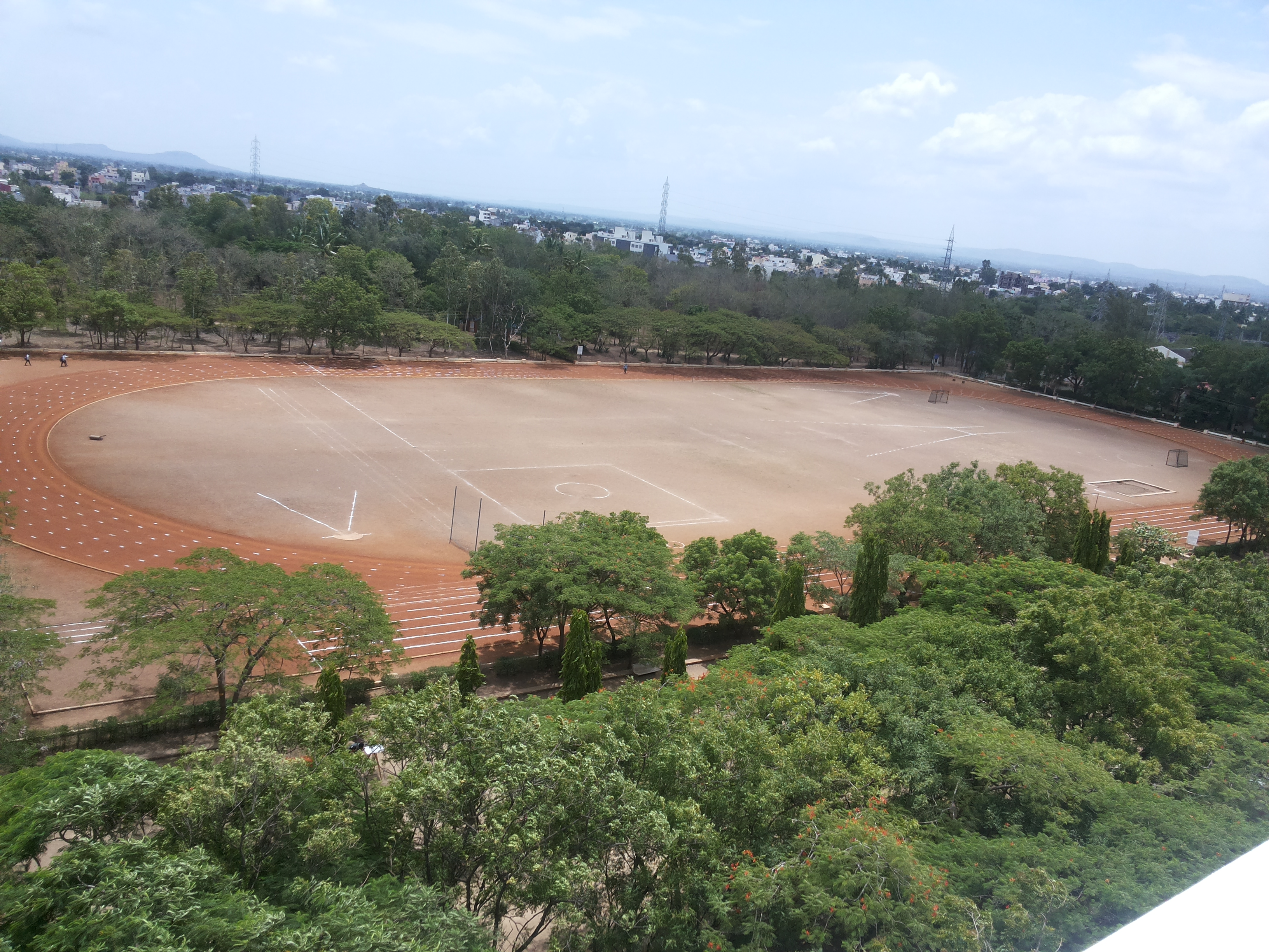 महाविद्यालयाचे १० एकराचे मैदान